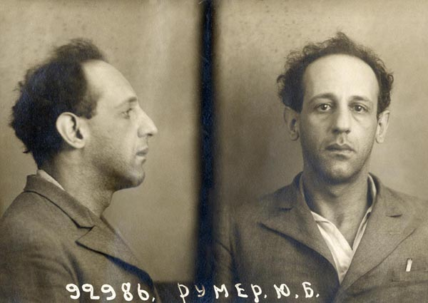 Yuri Rumer, case #23711